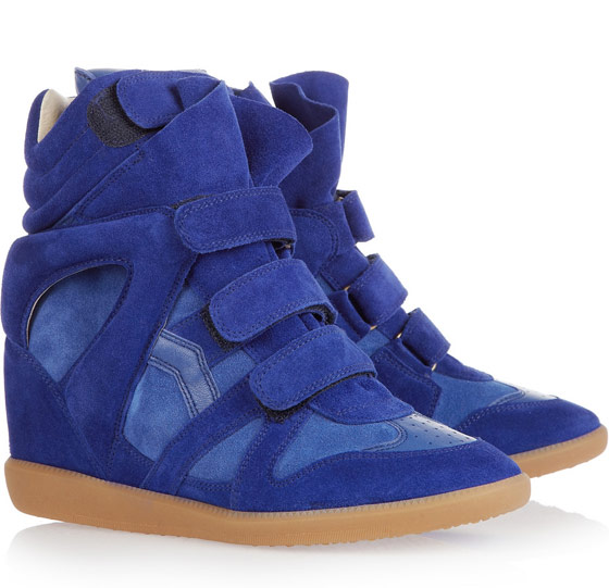 Создание данного вида кроссовок на танкетке приписывают в 2011 году модельеру из Франции Изабель Маран.